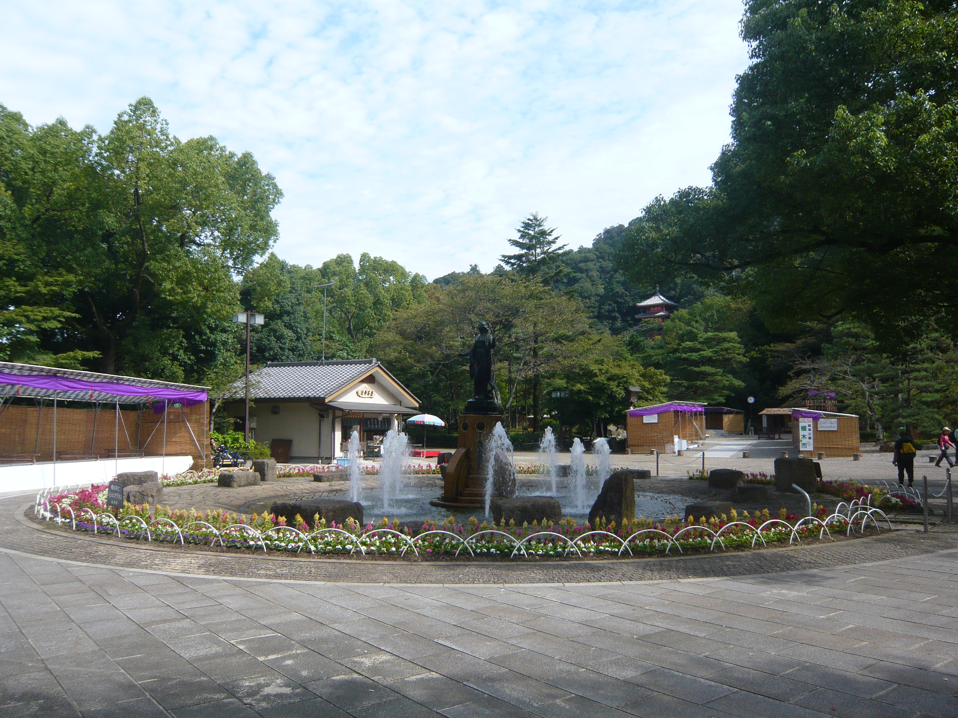 Gifu Park（岐阜公園）,Gifu,Gifu,Japan（岐阜県岐阜市）で撮影。